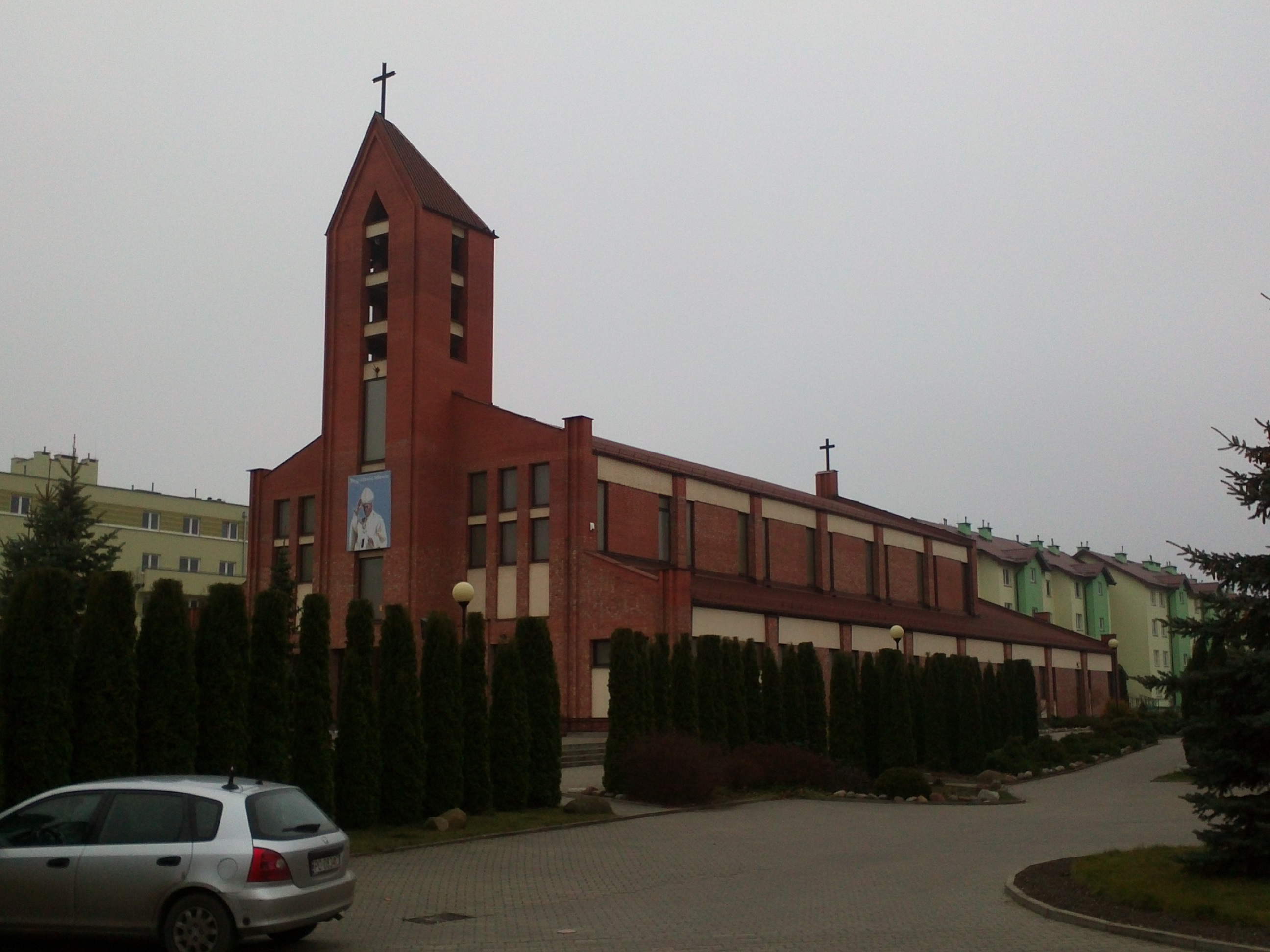 Budowa kościoła rozpoczęła się w 1995 r. Zakończoną ją w 2001 r.